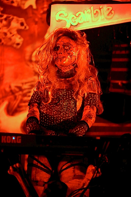 Tecladista Hella en la Sala Razzmatazz 2 de Barcelona el 27 de abril de 2013